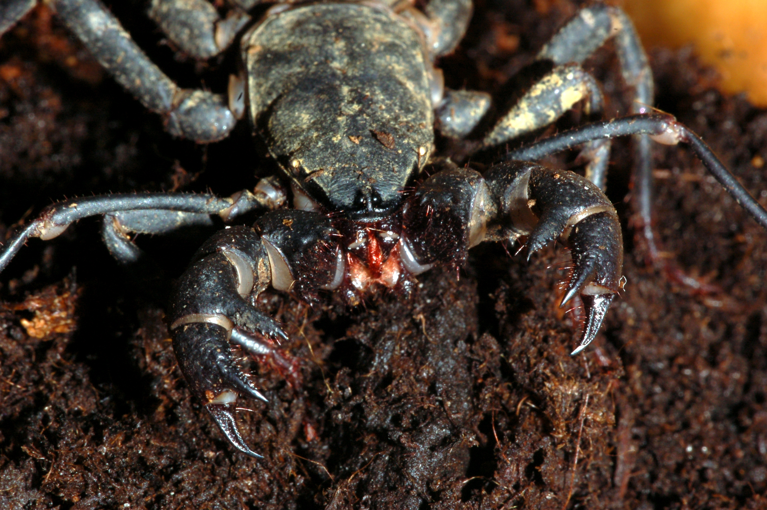 Typopeltis species (Uropygi: Typopeltinae) in Gefangenschaft, Museum Wiesbaden, Deutschland